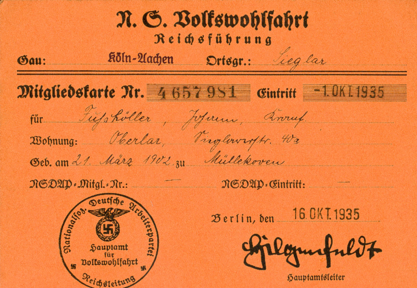 NSV-Mitgliedsausweis Objekt und Scan: Slg. Alexander Buschorn